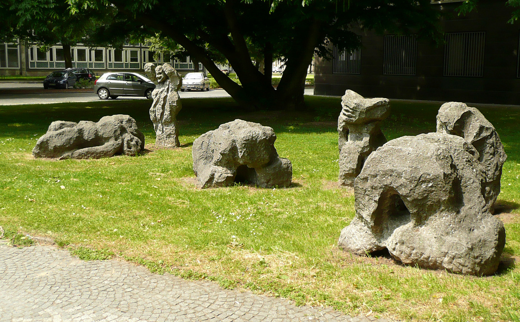 Die Grosse_Familie von Eugene_Dodeigne